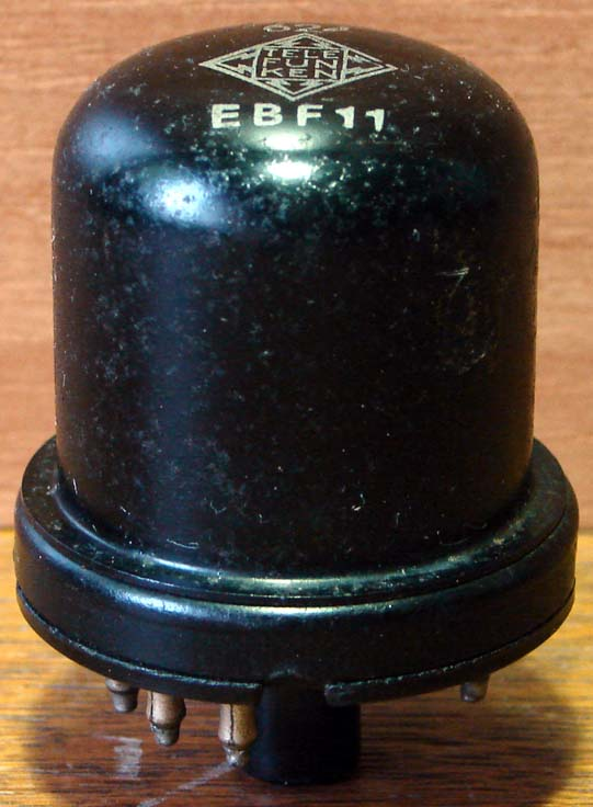 Röhre EBF11